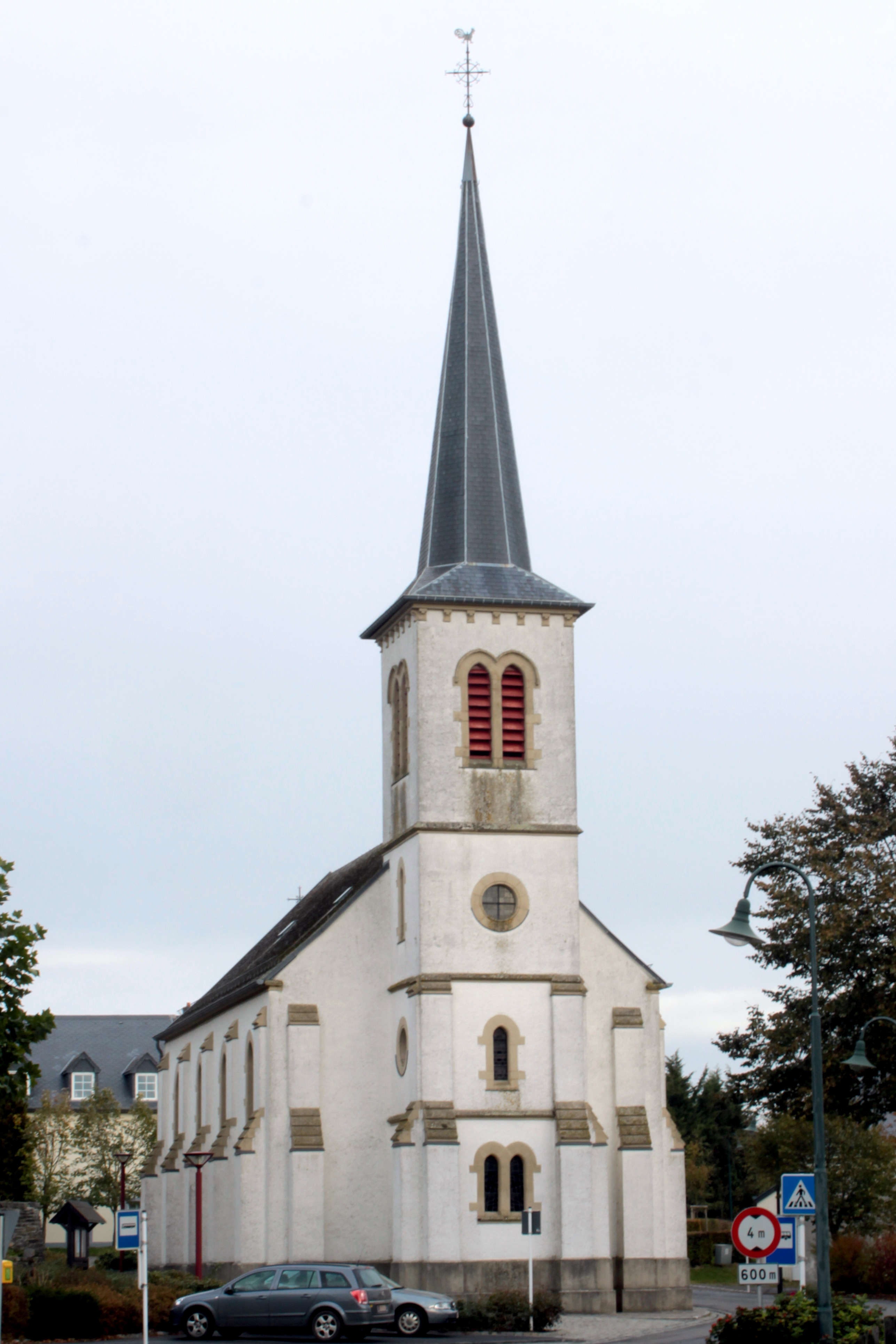 D'Kierch bu Beesslek